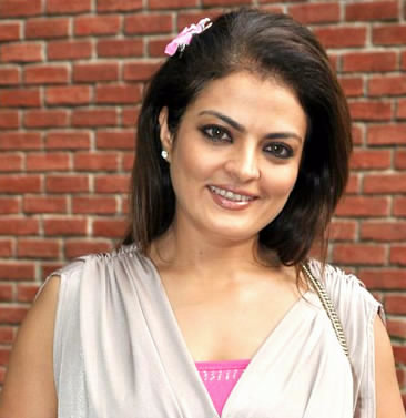 Sheeba at Mondo Casa launch